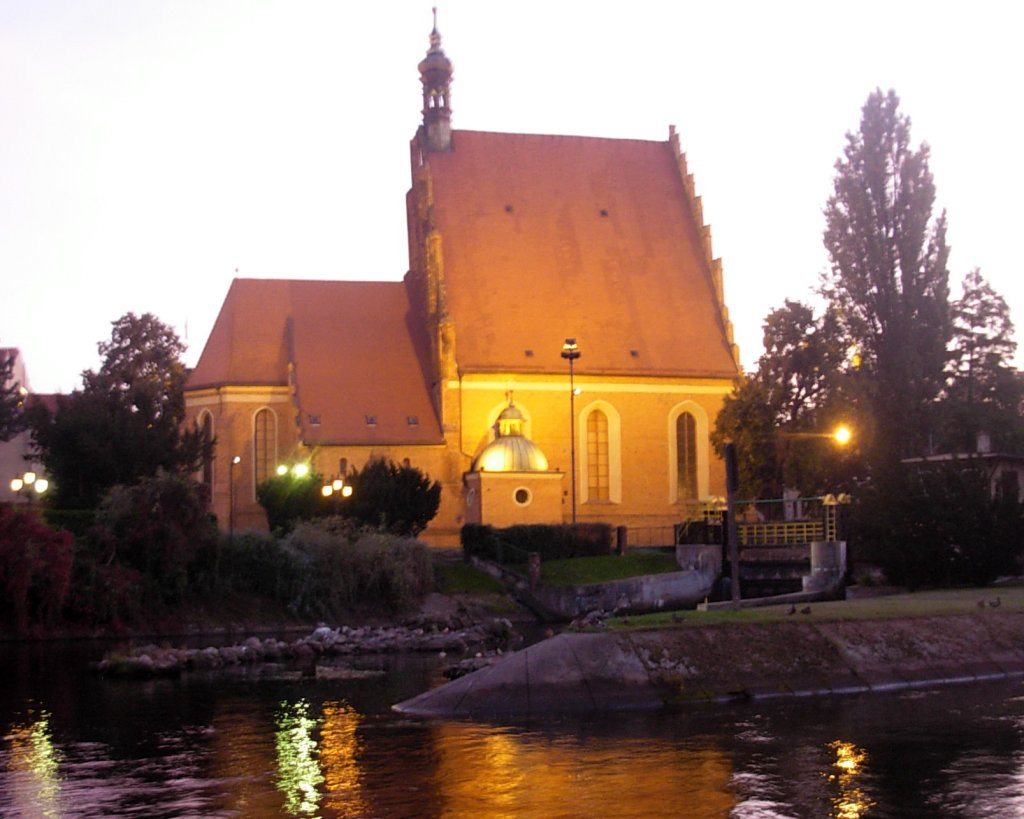 Katedra św. Marcina i Mikołaja w Bydgoszczy